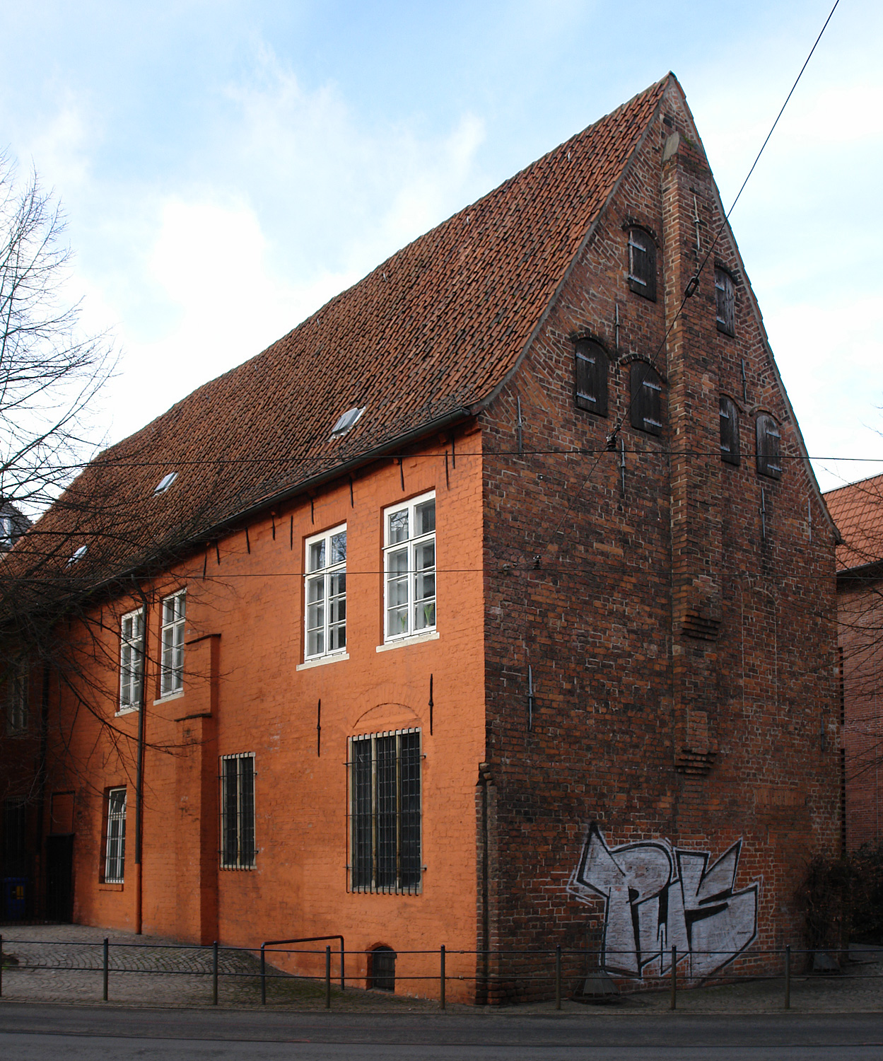 Bremen: Haus Heineken in der Sandstraße 3. Rückseite zur Violenstraße, Bau von 1579 mit Deckenmalerei